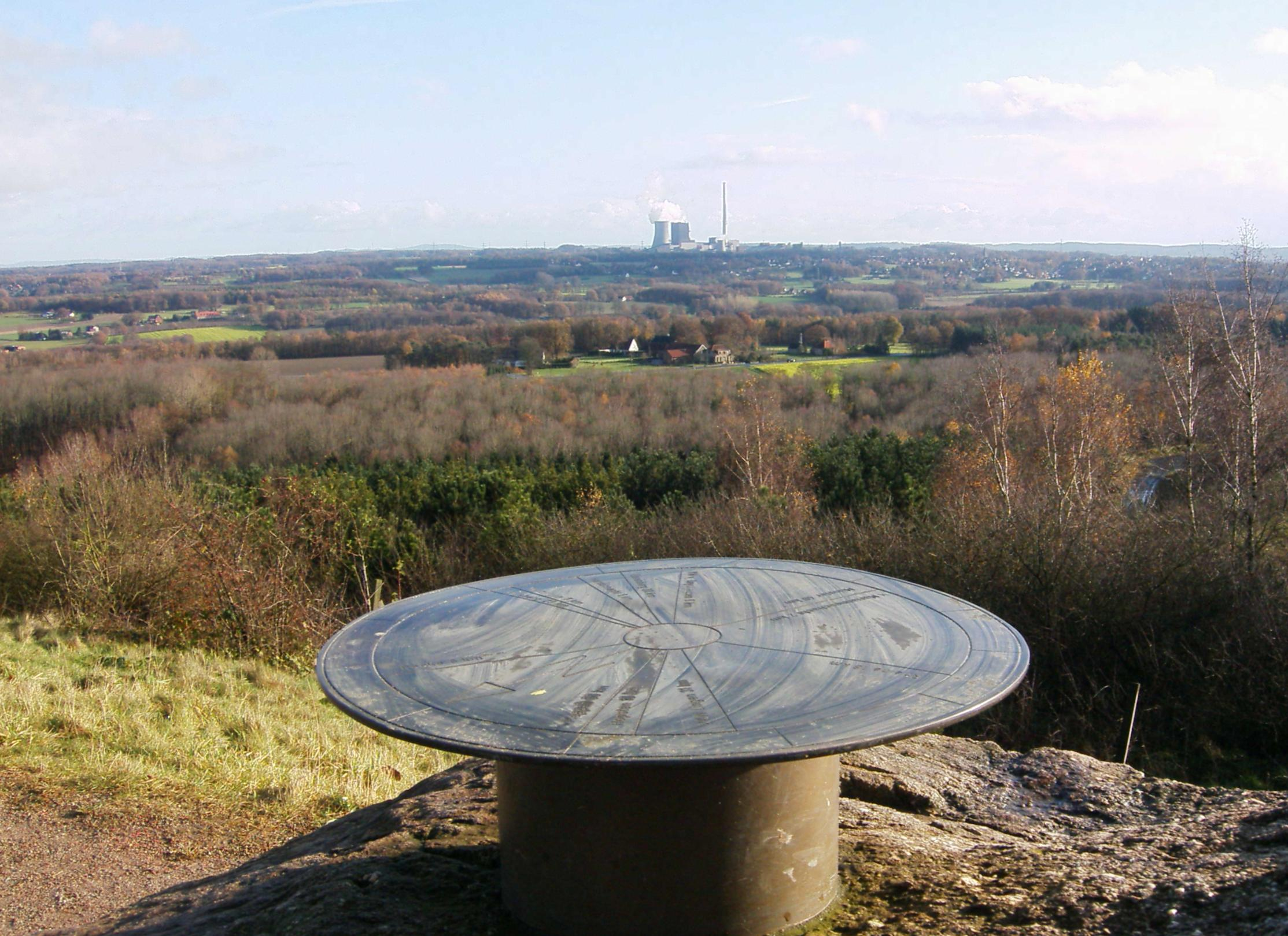 Blick vom Aussichtspunkt einer Bergehalde im Westfeld auf das Steinkohlekraftwerk Ibbenbüren (Halde am ehemaligen Rudolfschacht)